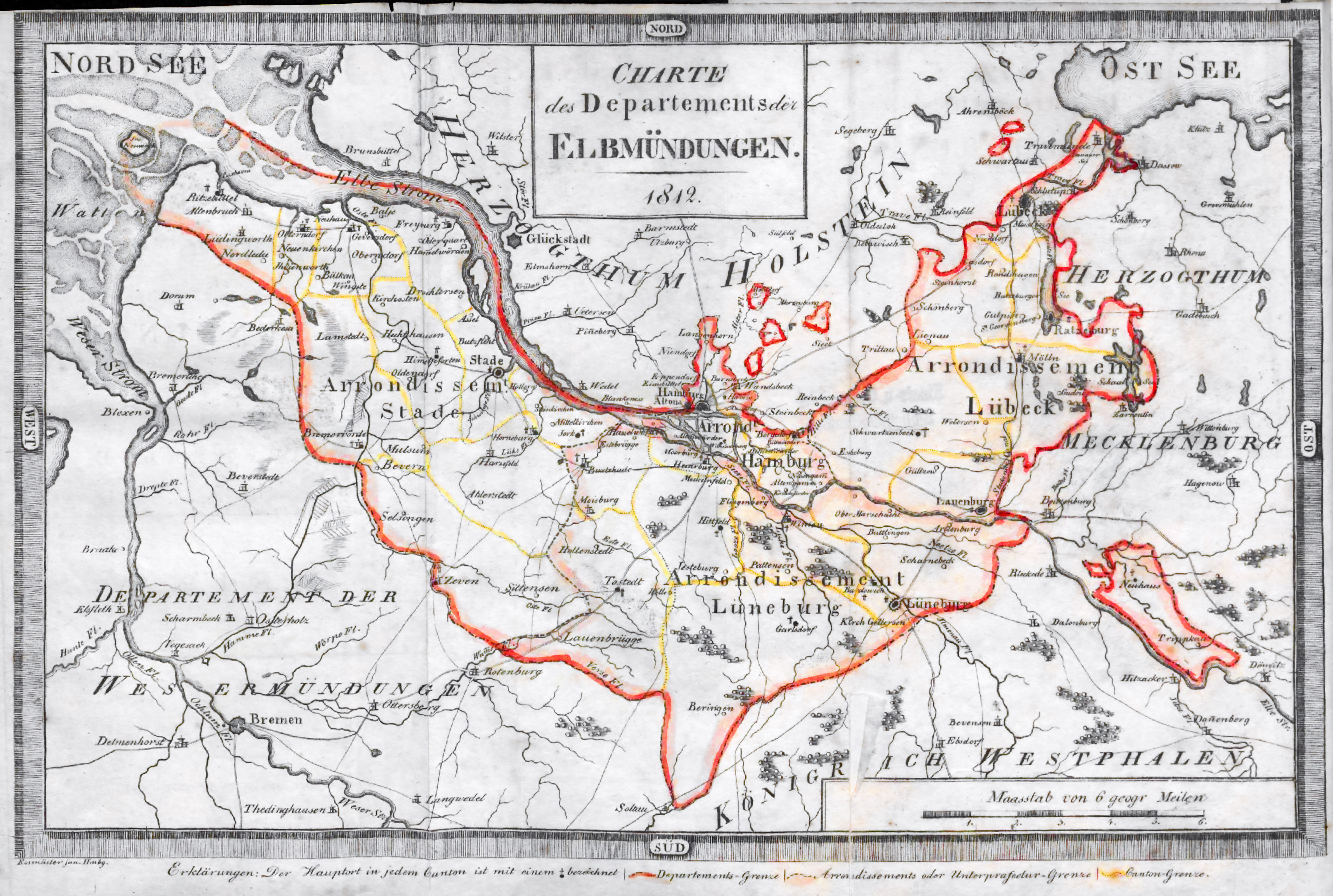 Karte des Département des Bouches de l'Elbe.